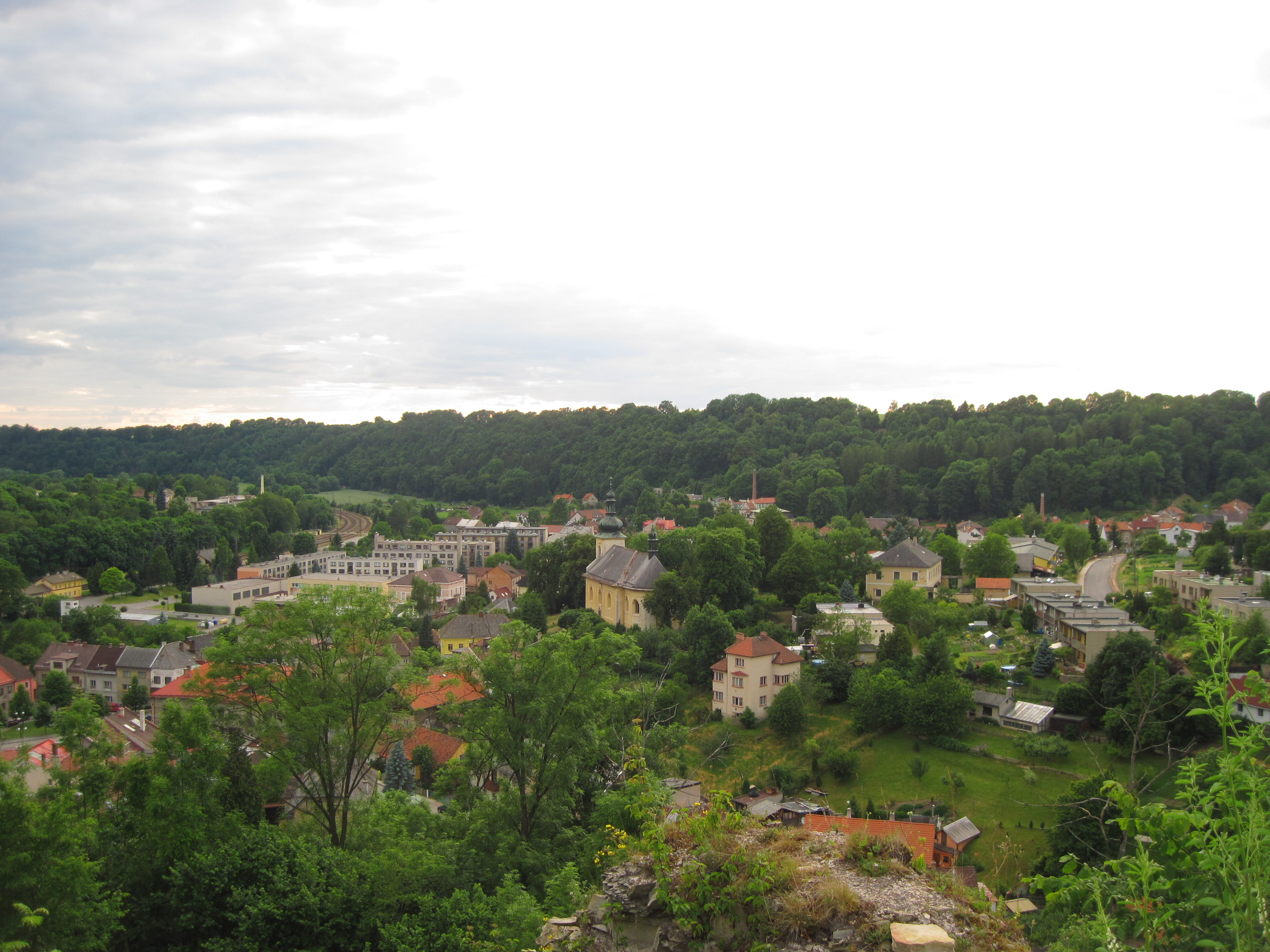 pohled shora